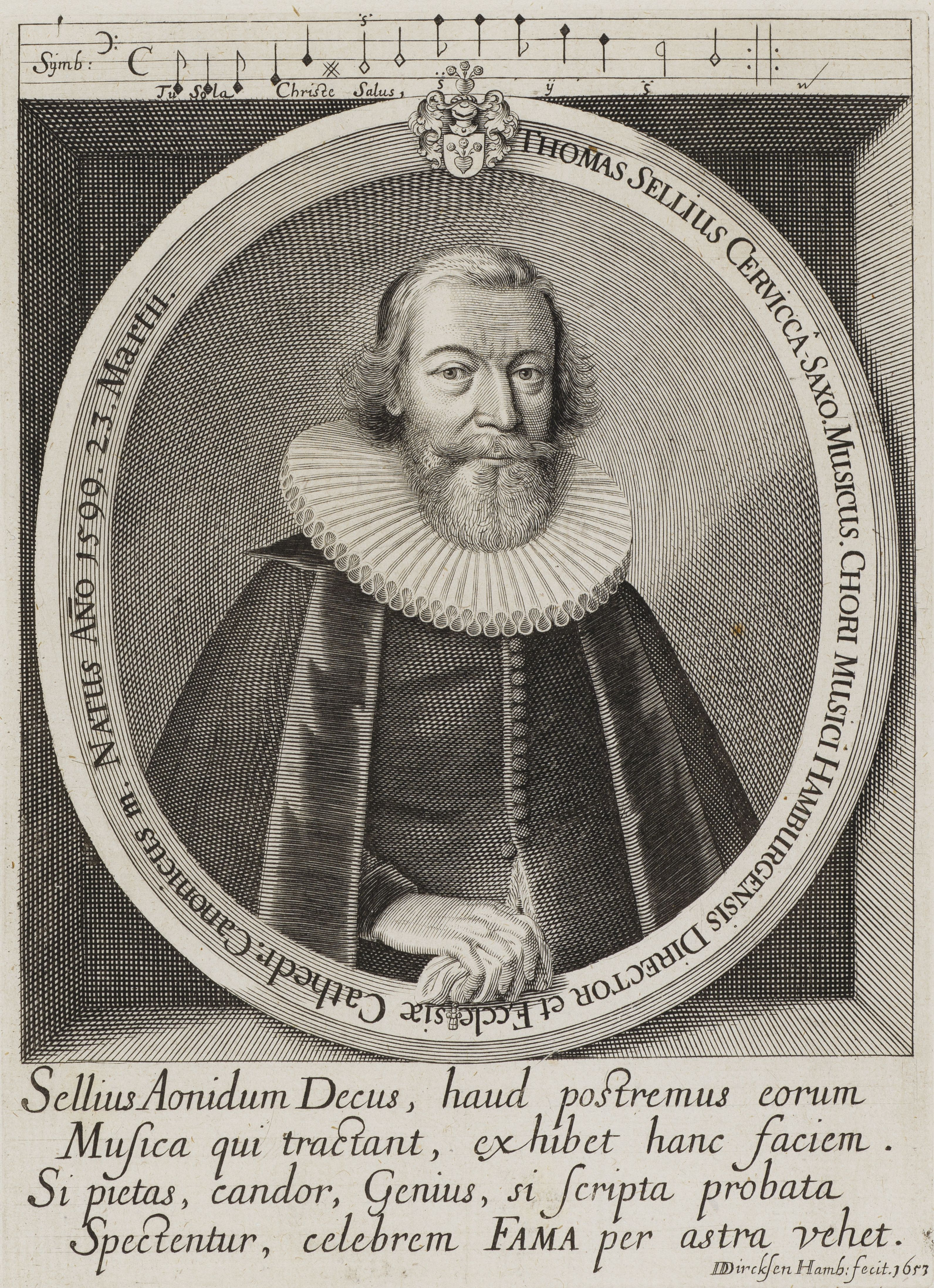 Bildnis von Thomas Selle